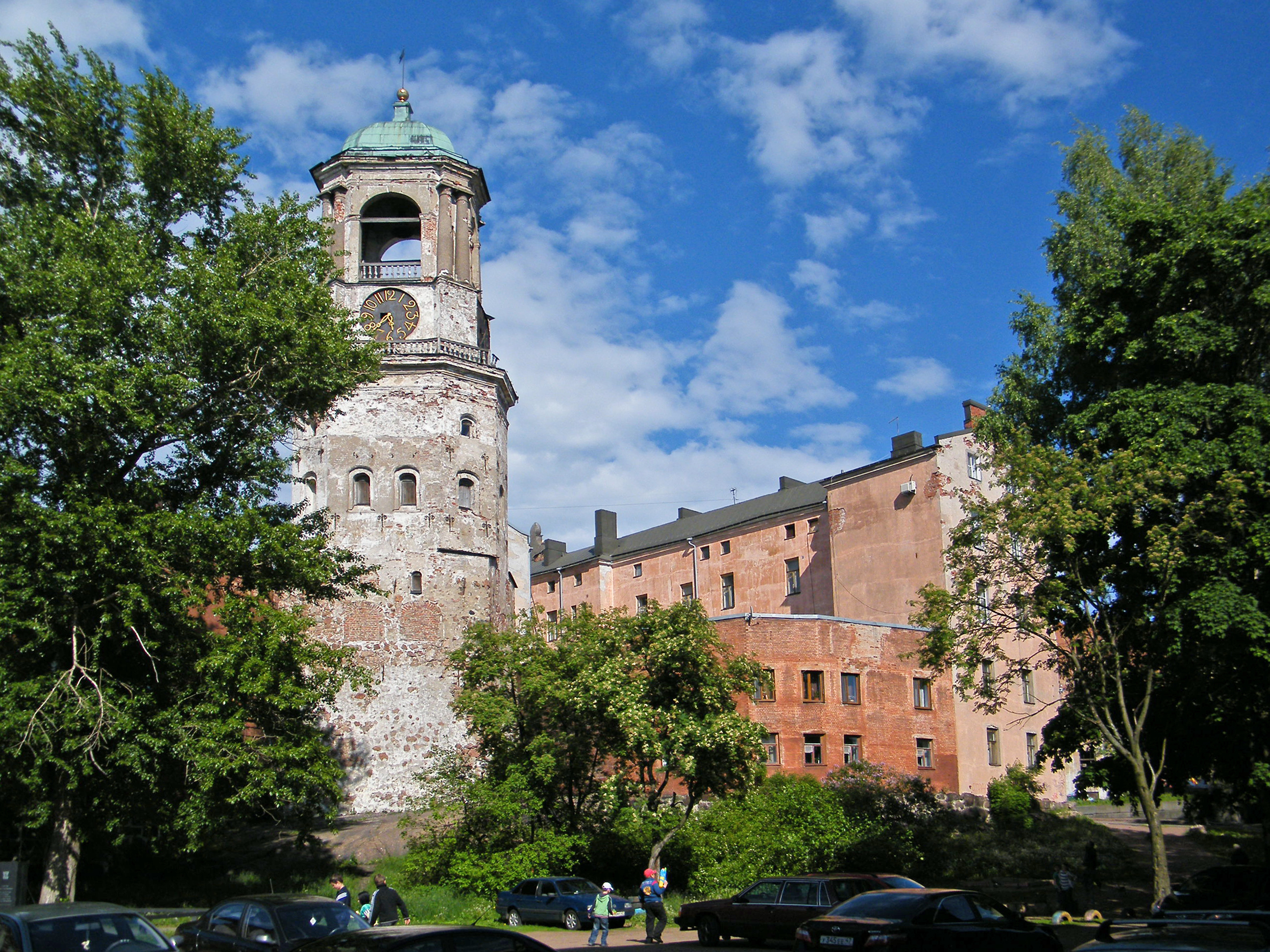 Часовая башня